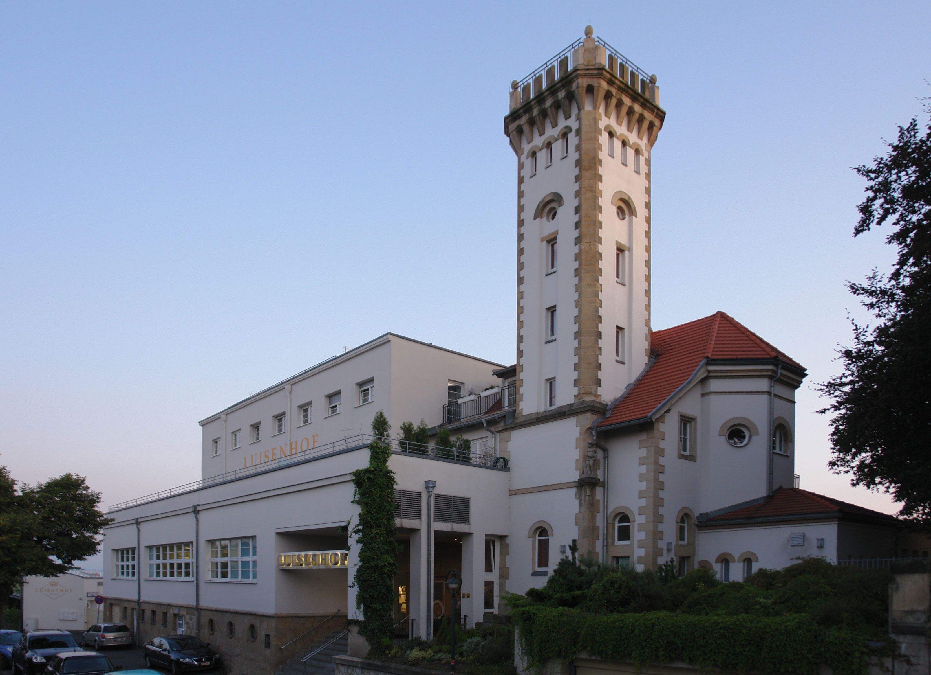 Luisenhof am Abend